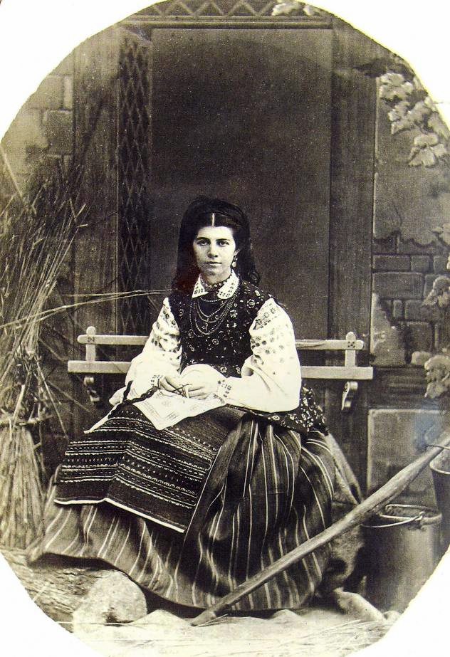 Олена Пчілка (Ольга Косач) у волинському строї.